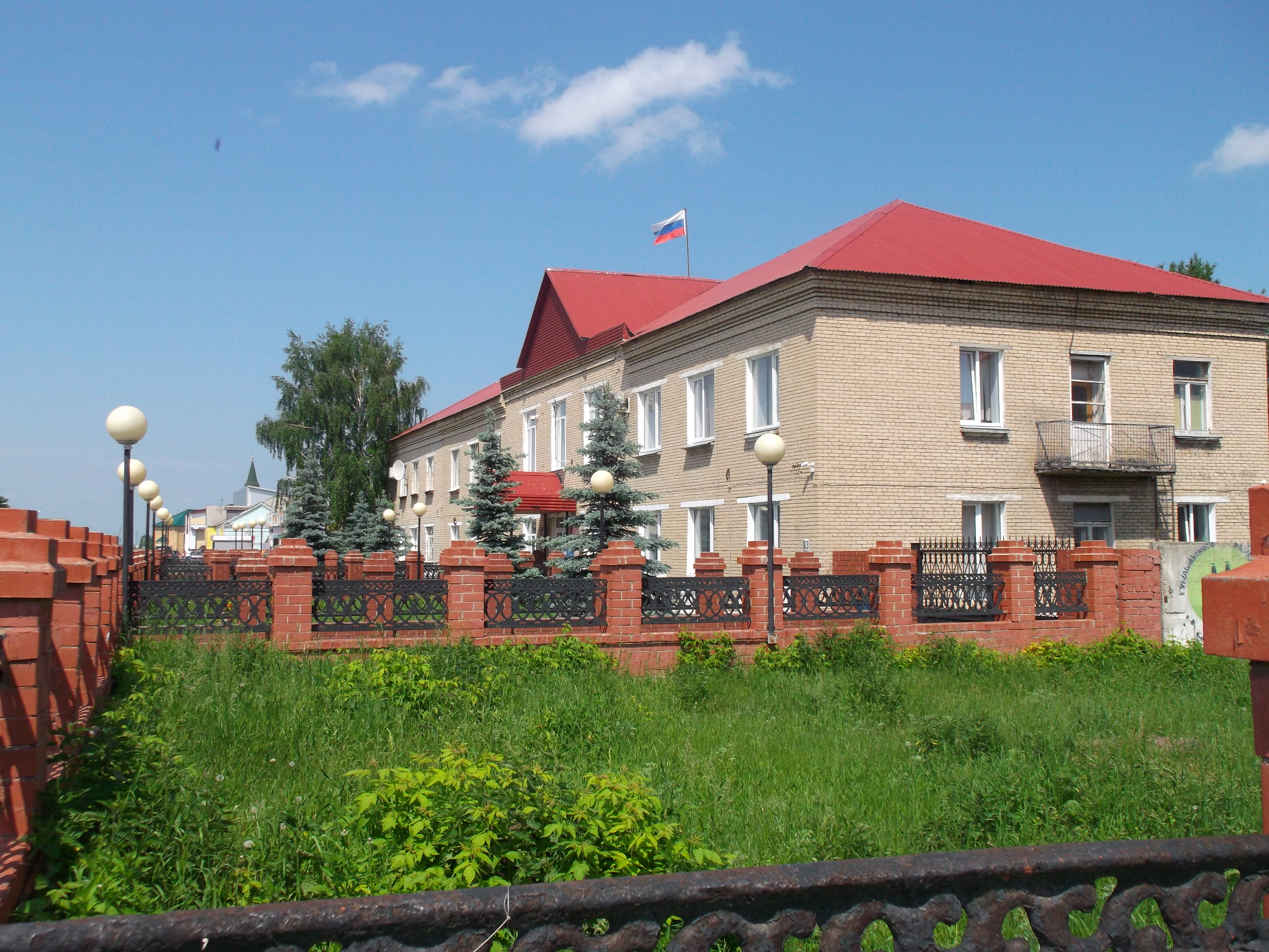 село Кунашак